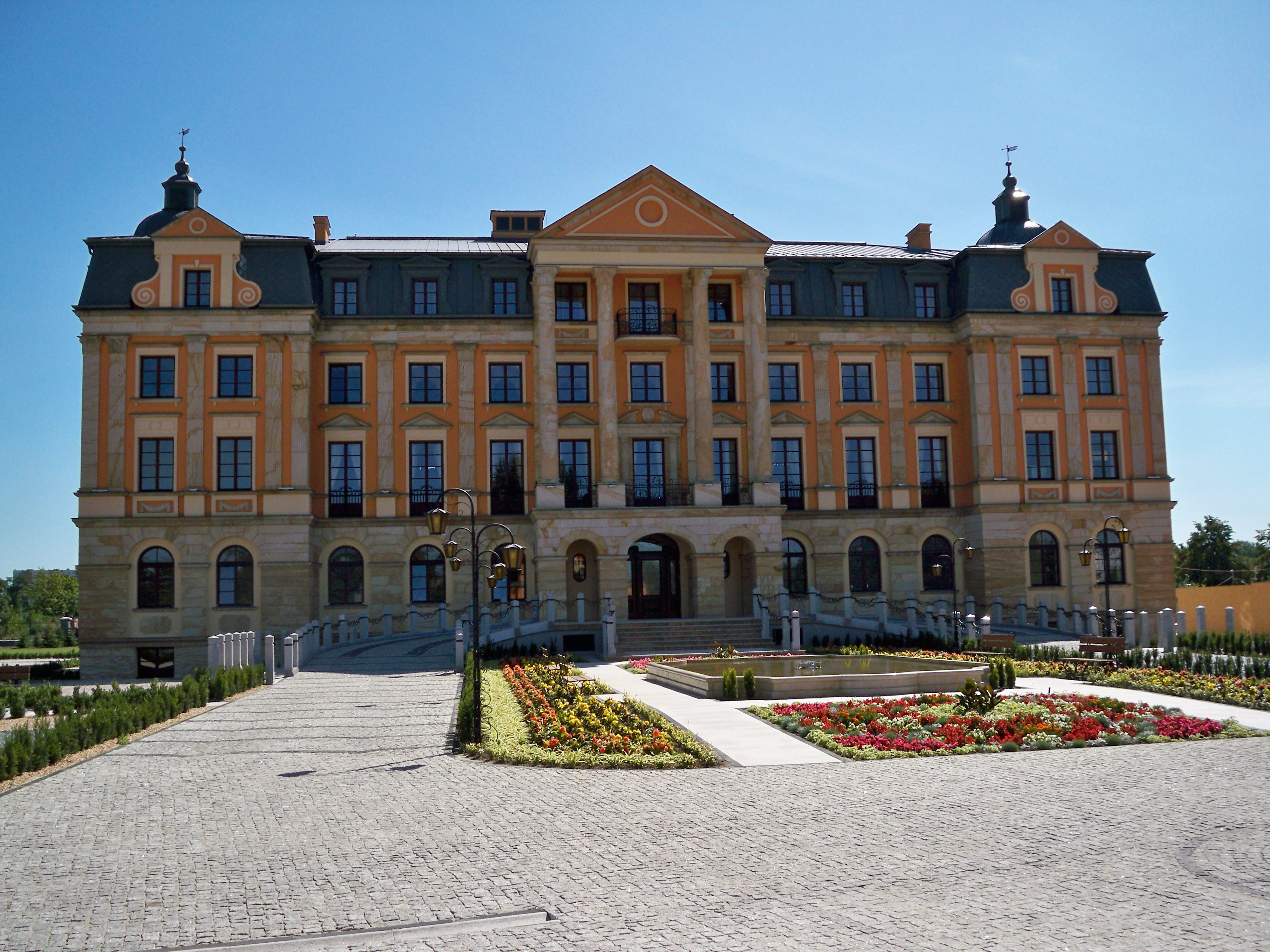 Pałac Bursztynowy (2009 r.)